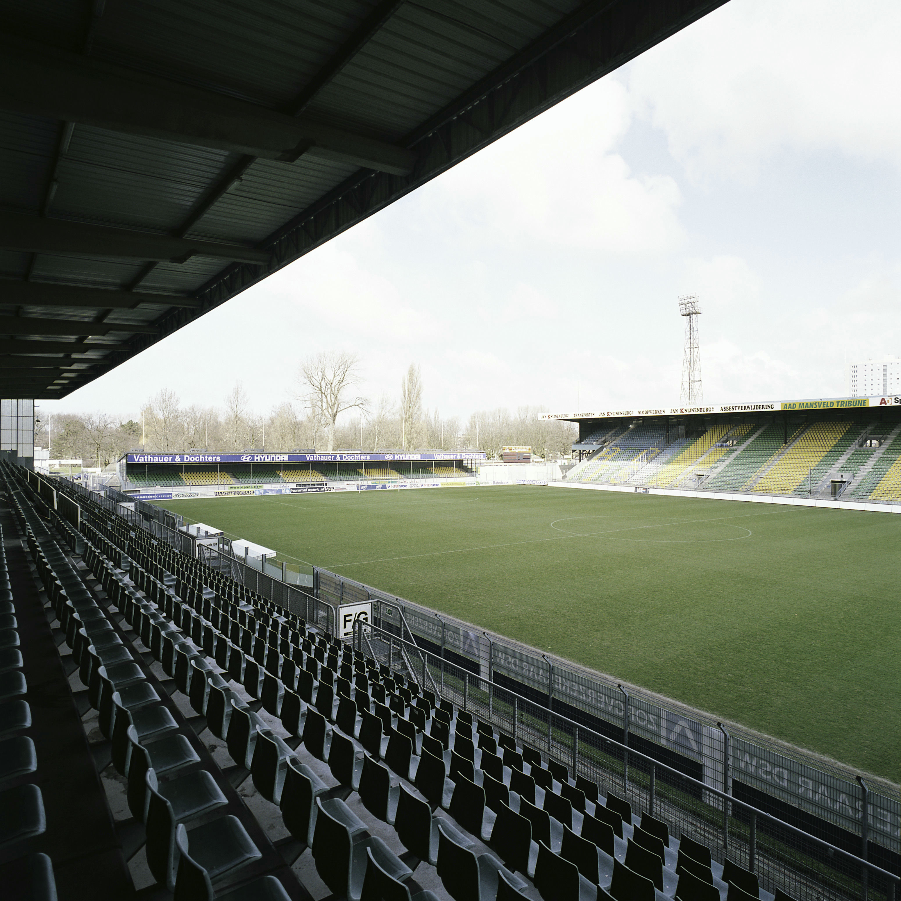 Zuiderparkstadion: Overzicht interieur stadion vanaf de noordtribune